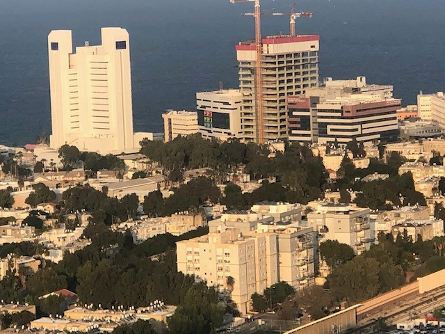 מראה הקמפוס המערבי החדש - ביה"ח רמב"ם. במרכז: מגדל התגליות ע"ש הלמסלי. משמאל: הפקולטה לרפואה